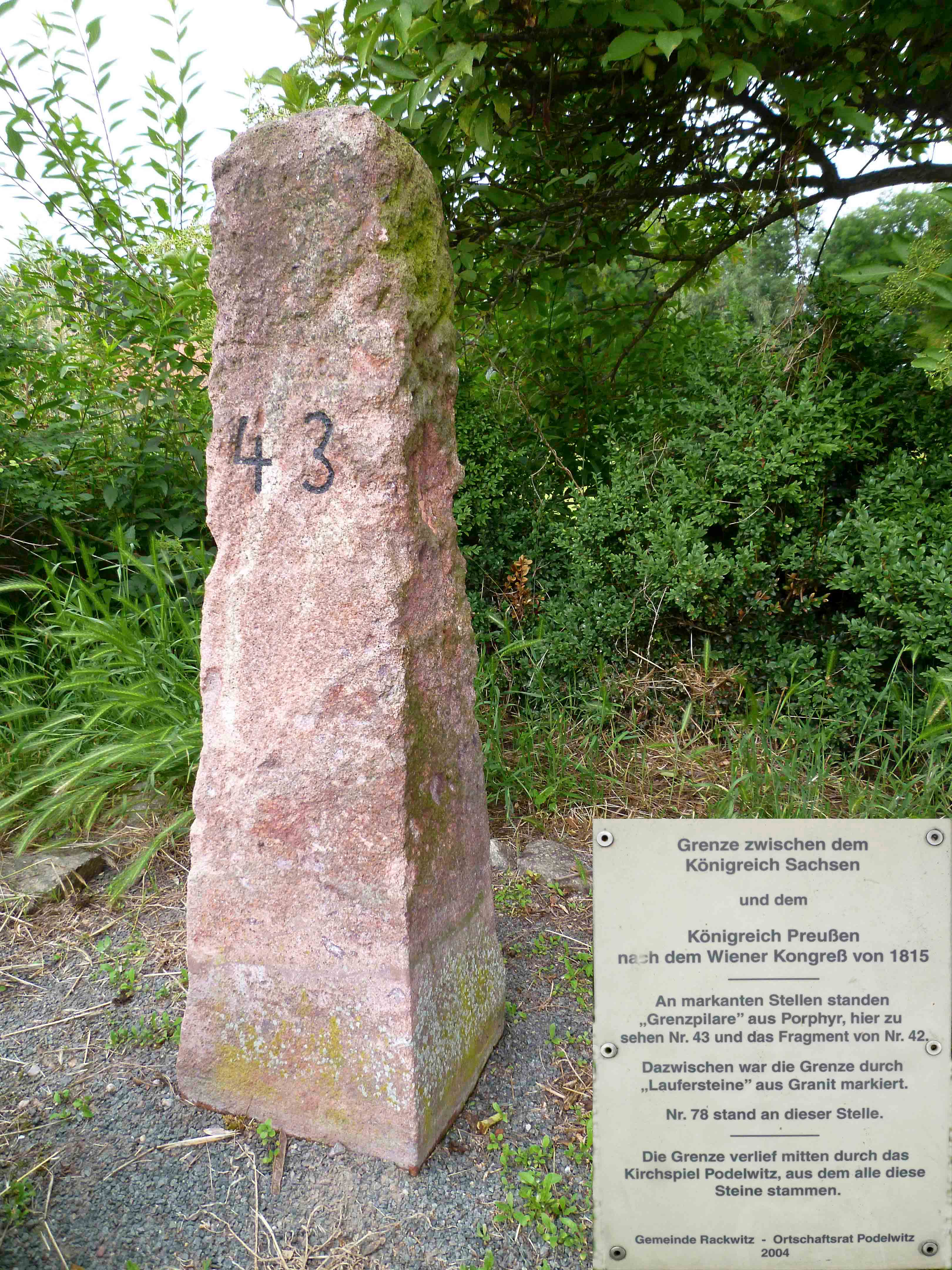 Grenzstein Nr. 43 Historische Landesgrenze Königreich Sachsen Königreich Preußen 1815 (Wiener Kongress) in Rackwitz OT Podelwitz Bemerkung: Der Grenzstein Nr. 43 steht in einer Steinsammlung, in der sich noch das Fragment des Grenzstein Nr. 42 sowie die Läufersteine Nr. 15, 19, 47, 48, und 78 befinden. Der Läuferstein Nr. 78 steht an seinem Originalstandort.